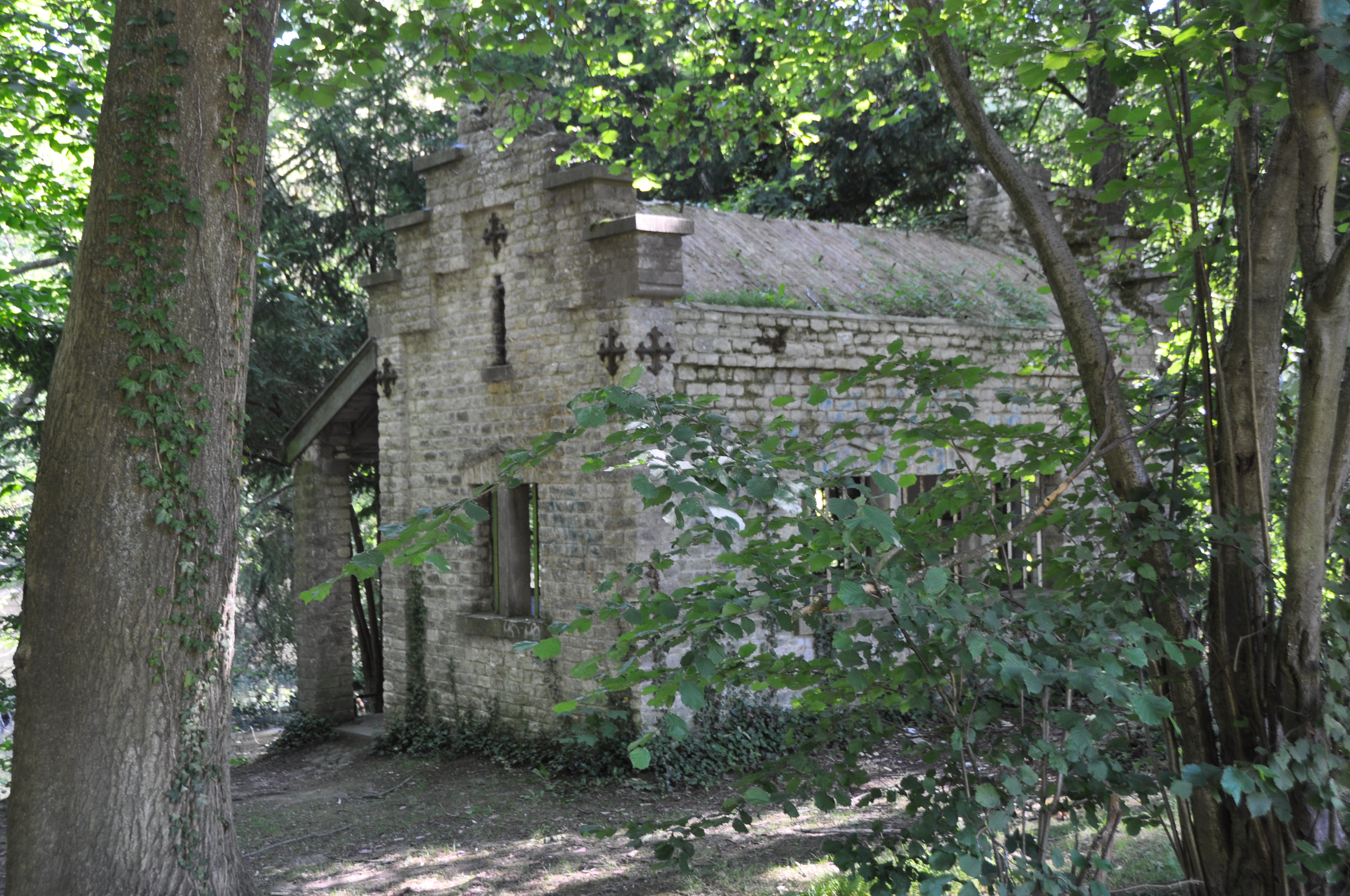 Ruine du Prieuré de Sept Fontaines